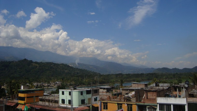 vista de la ciudad de sivia PERU AYACUCHO